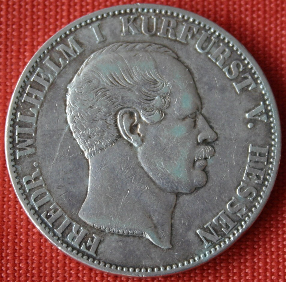 1 Taler von 1855 mit Konterfei Friedrich Wilhelm I.